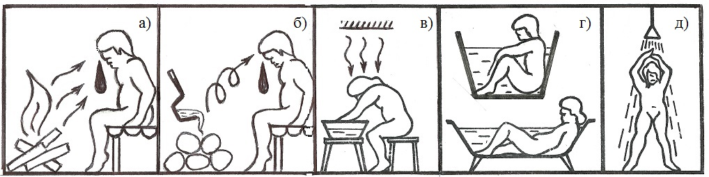 Способы омовения